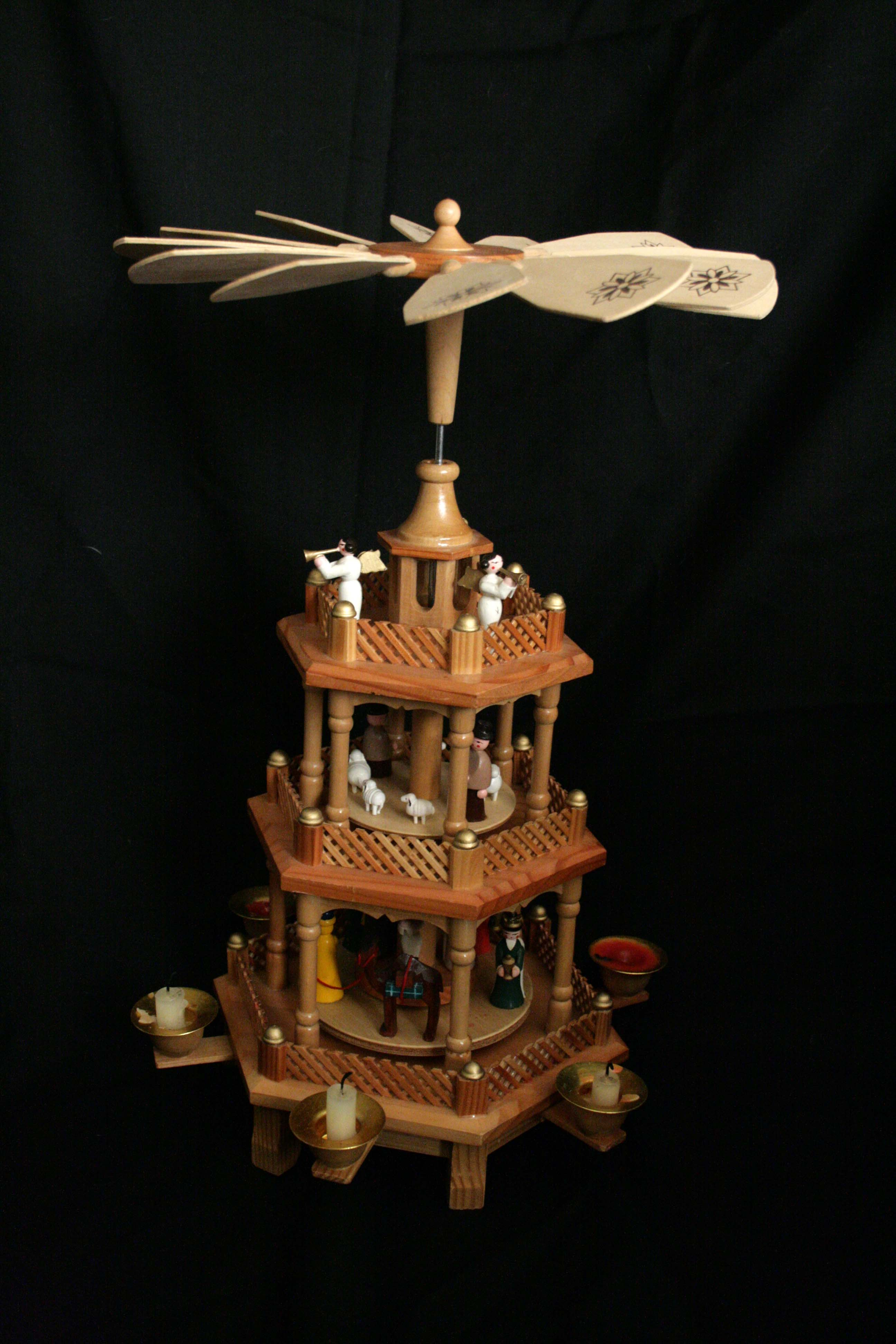 Weihnachtspyramide (Christmas pyramid) from Germany in Erzgebirge Kunst